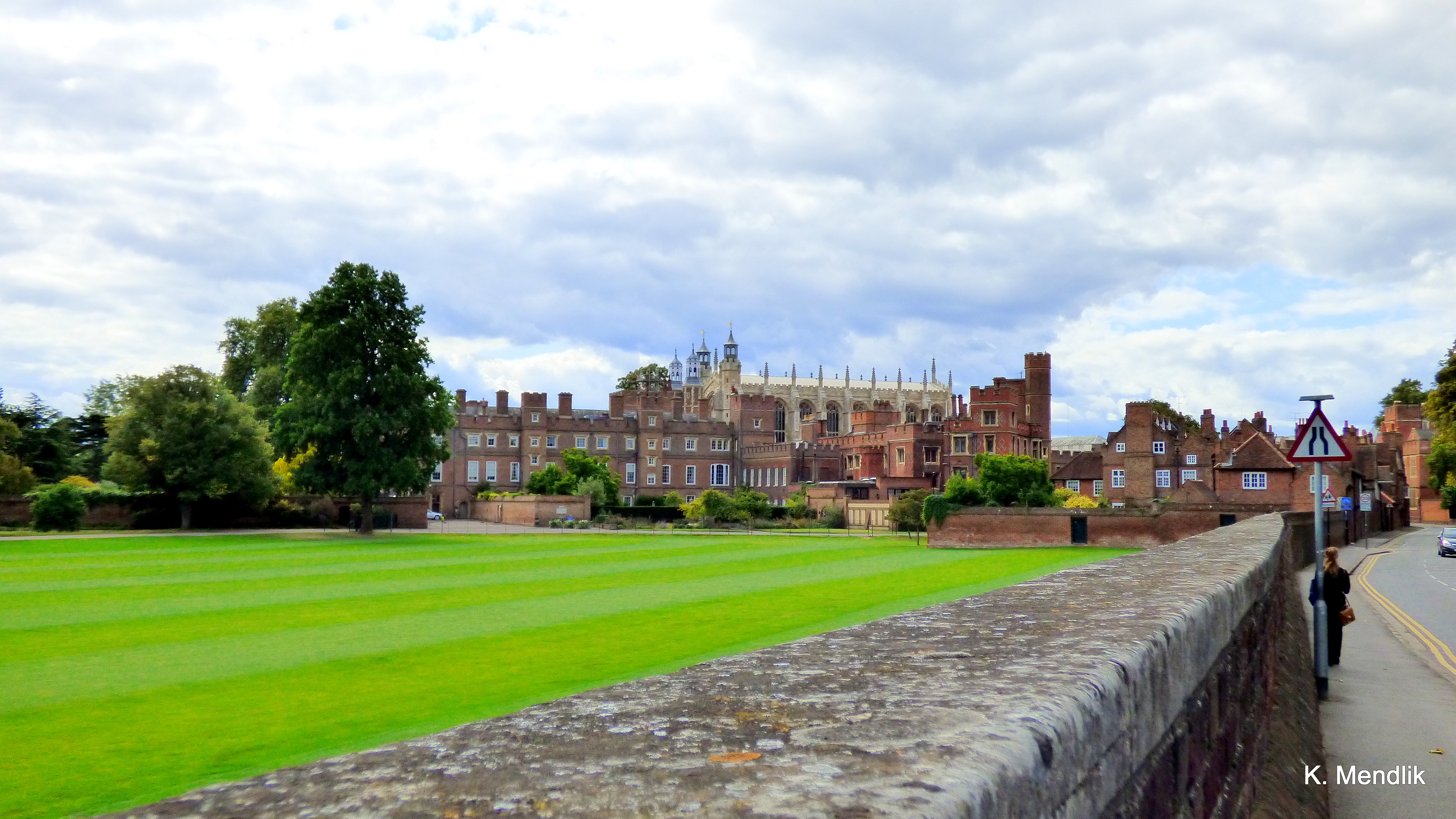 . Widok z ulicy - Eton College